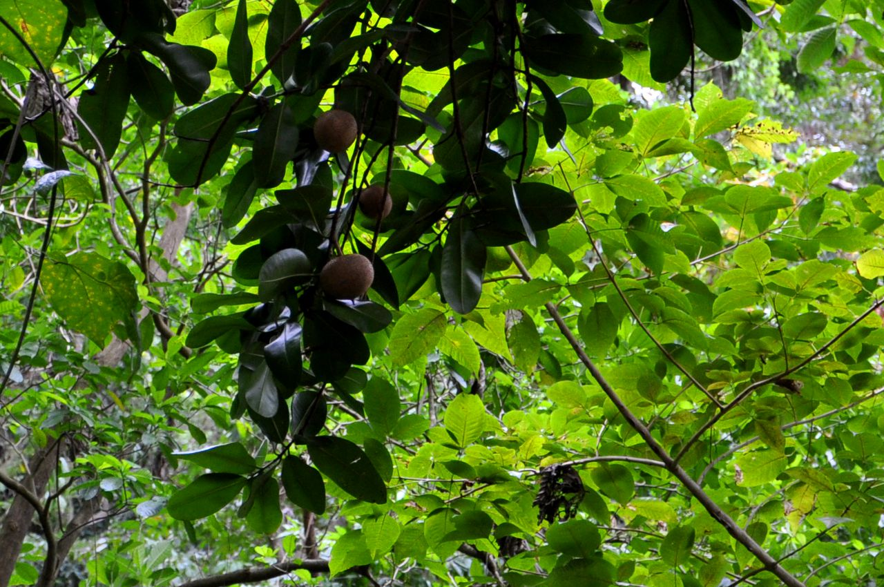 Branches d'abricotier avec fruits.